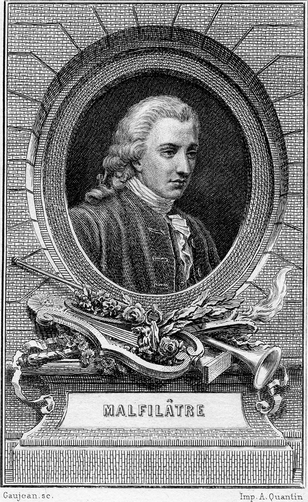 Portrait of Jacques Clinchamps de Malfilâtre (1733-1767)